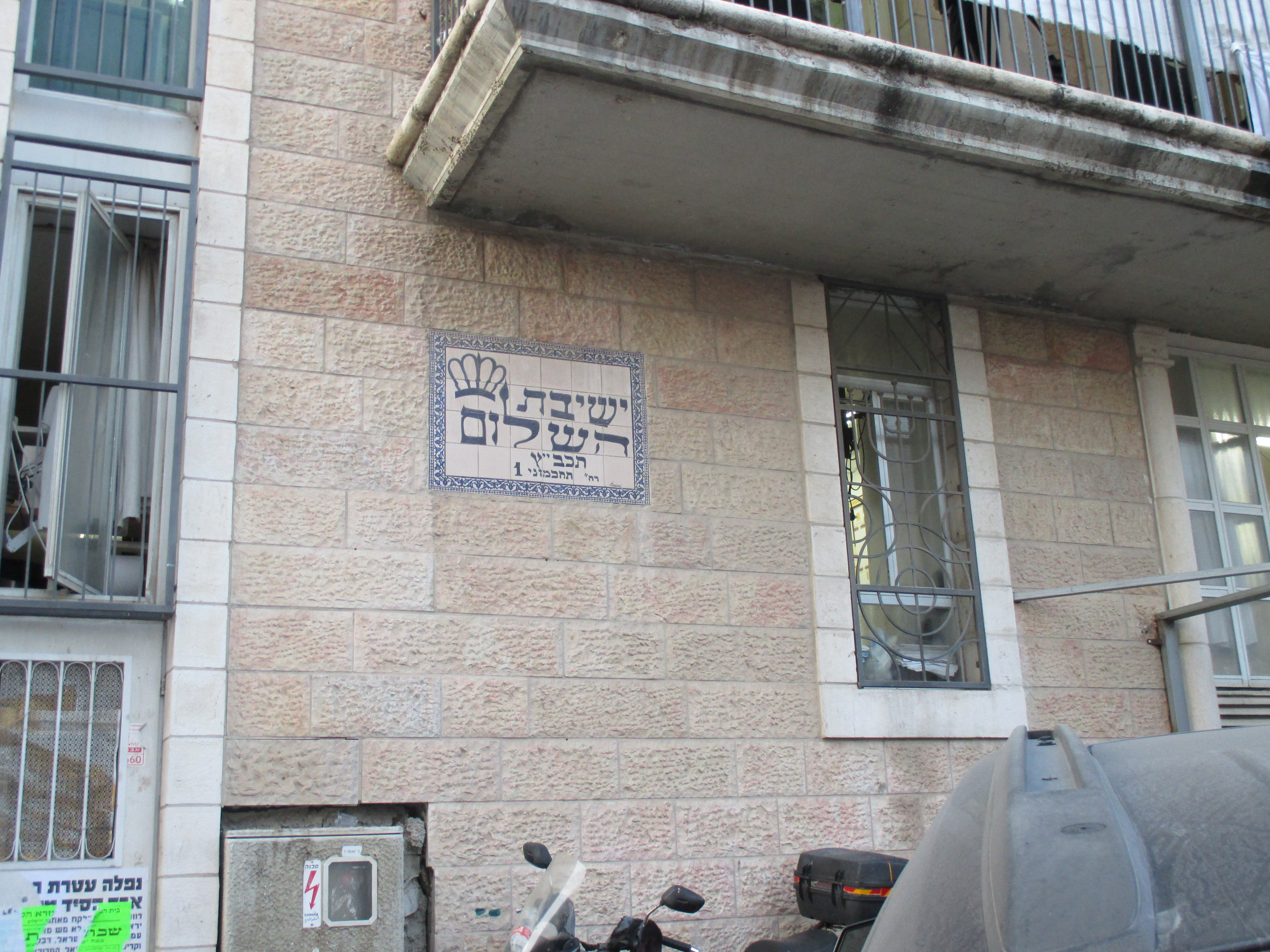 ישיבת השלום ברחוב תחכמוני בירושלים